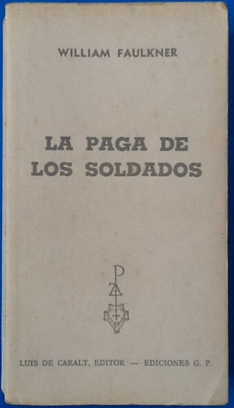 Portada del libro de William Faulkner, La Paga de los Soldados.